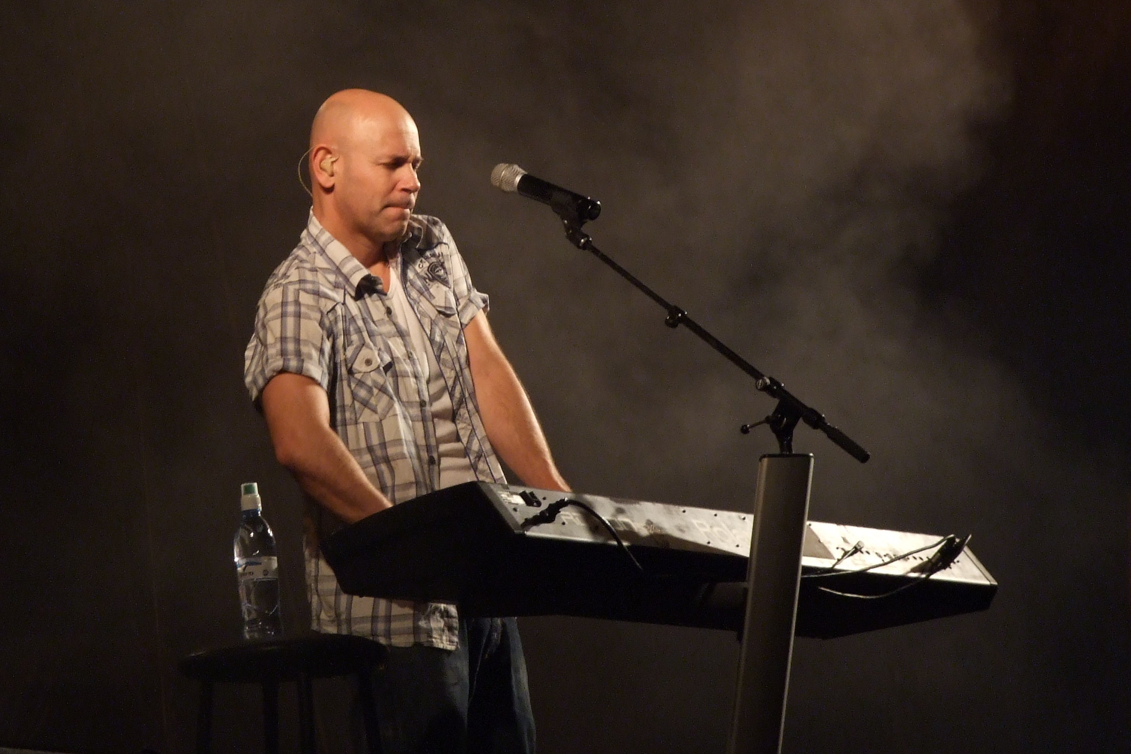 רמי קלינשטיין בהופעה נוצר על ידי משתמש:Realmgic